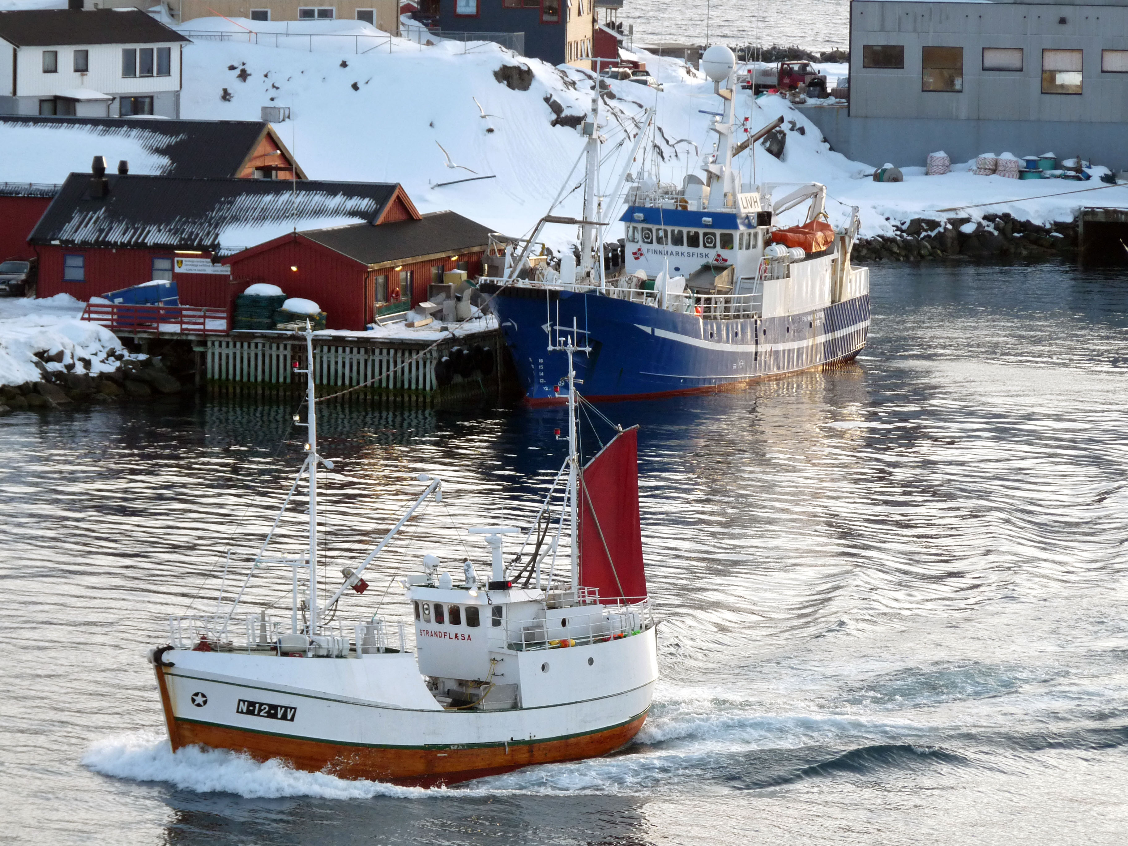 34 Honningsvåg